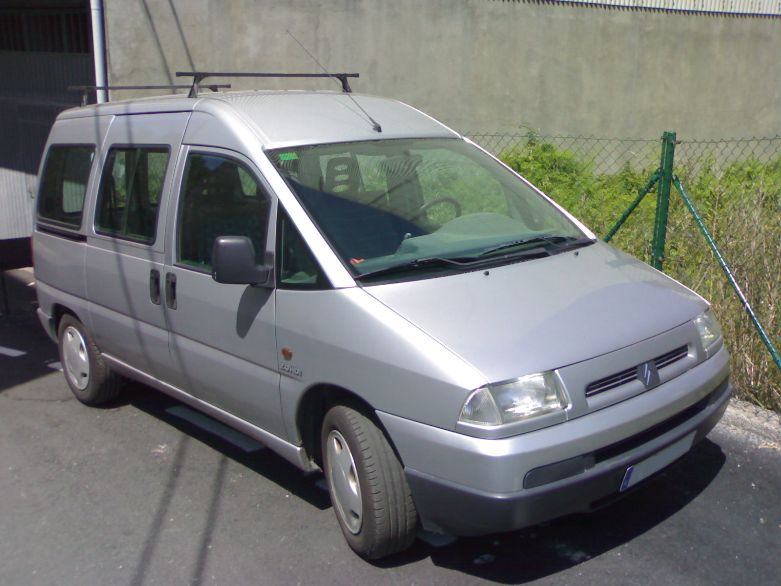 Una furgoneta Citroën Jumpy.